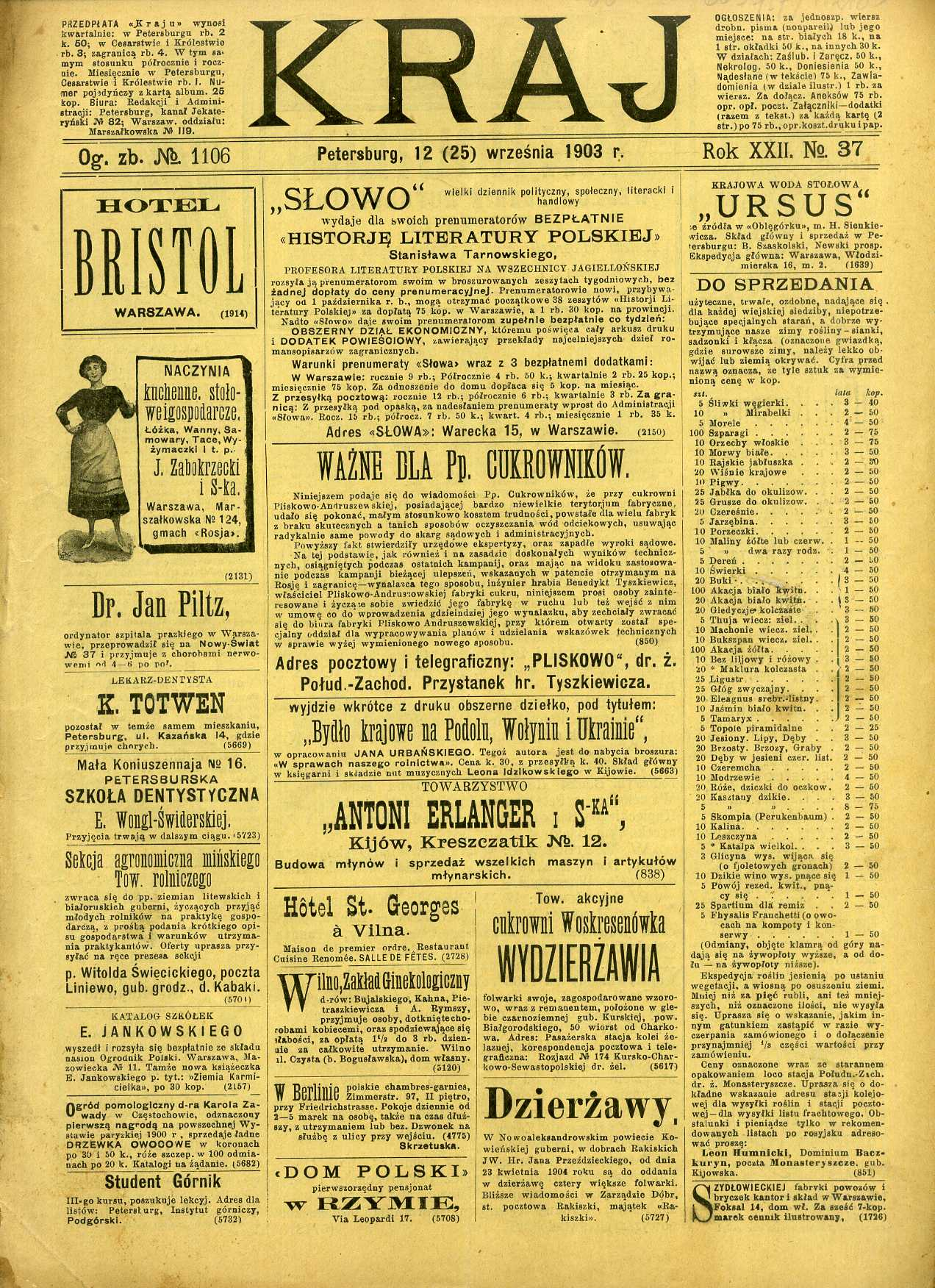 Okładka tygodnika Kraj wydawanego w Petersburgu.